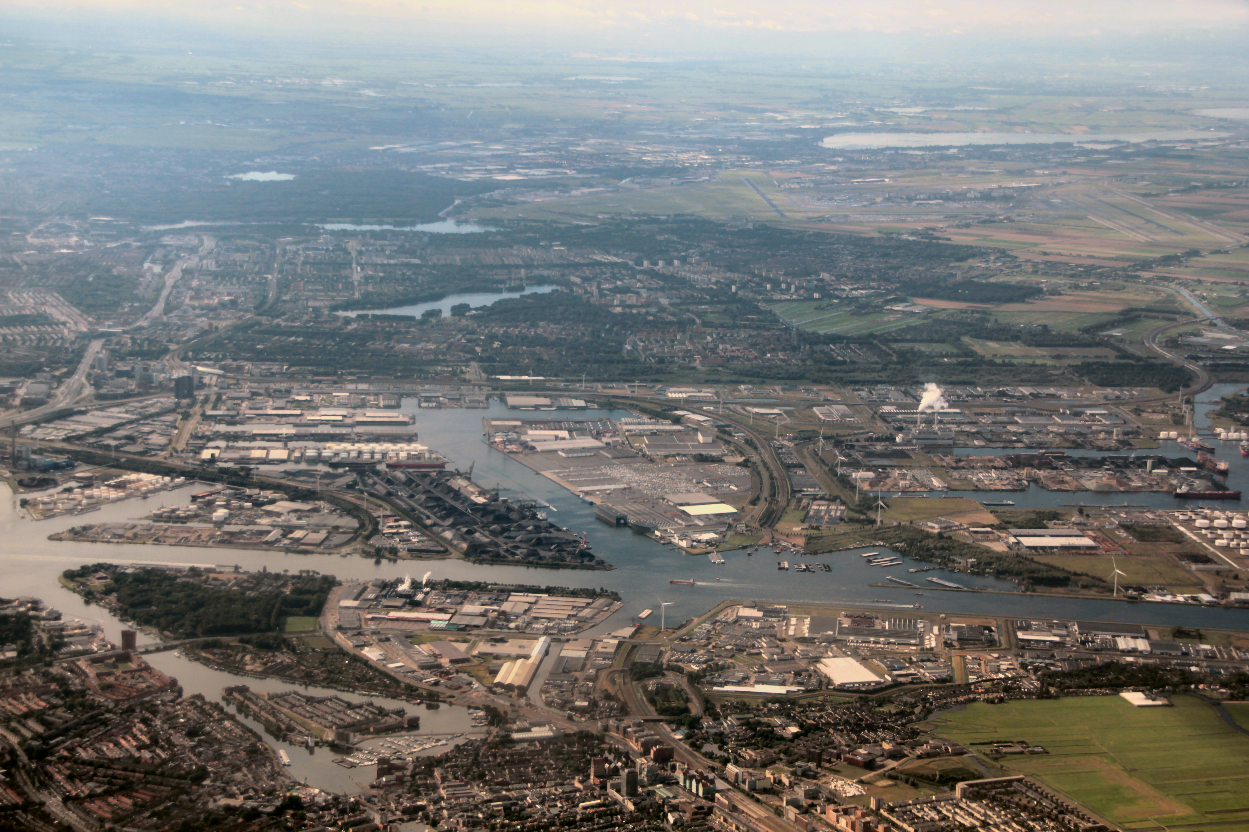 Gezicht op de Hemtunnel en het Noordzeekanaal vanaf het noorden. Het oude Hembrug tracé is links nog steeds te onderscheiden. September 2013